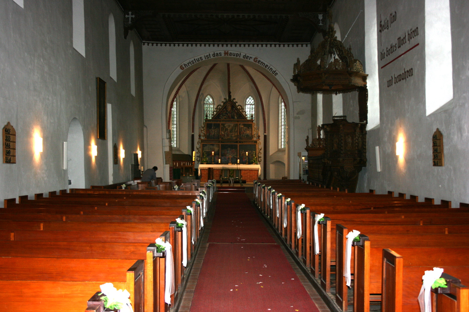 Kreisbahn Aurich Innenraum der Kirche Victorbur